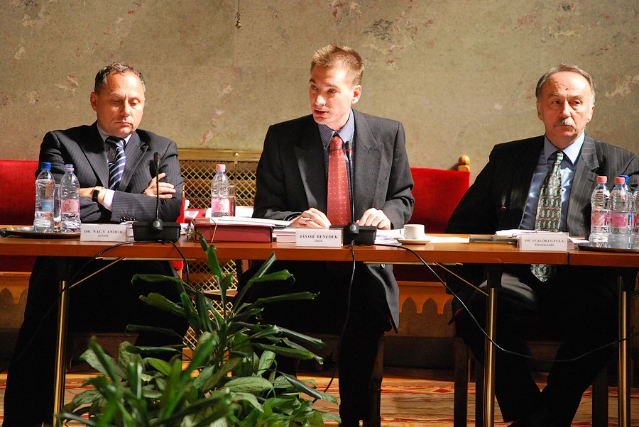 A Fenntartható Fejlődés Bizottságának tagjai: Nagy Andor, Jávor Benedek, Szalóki Gyula